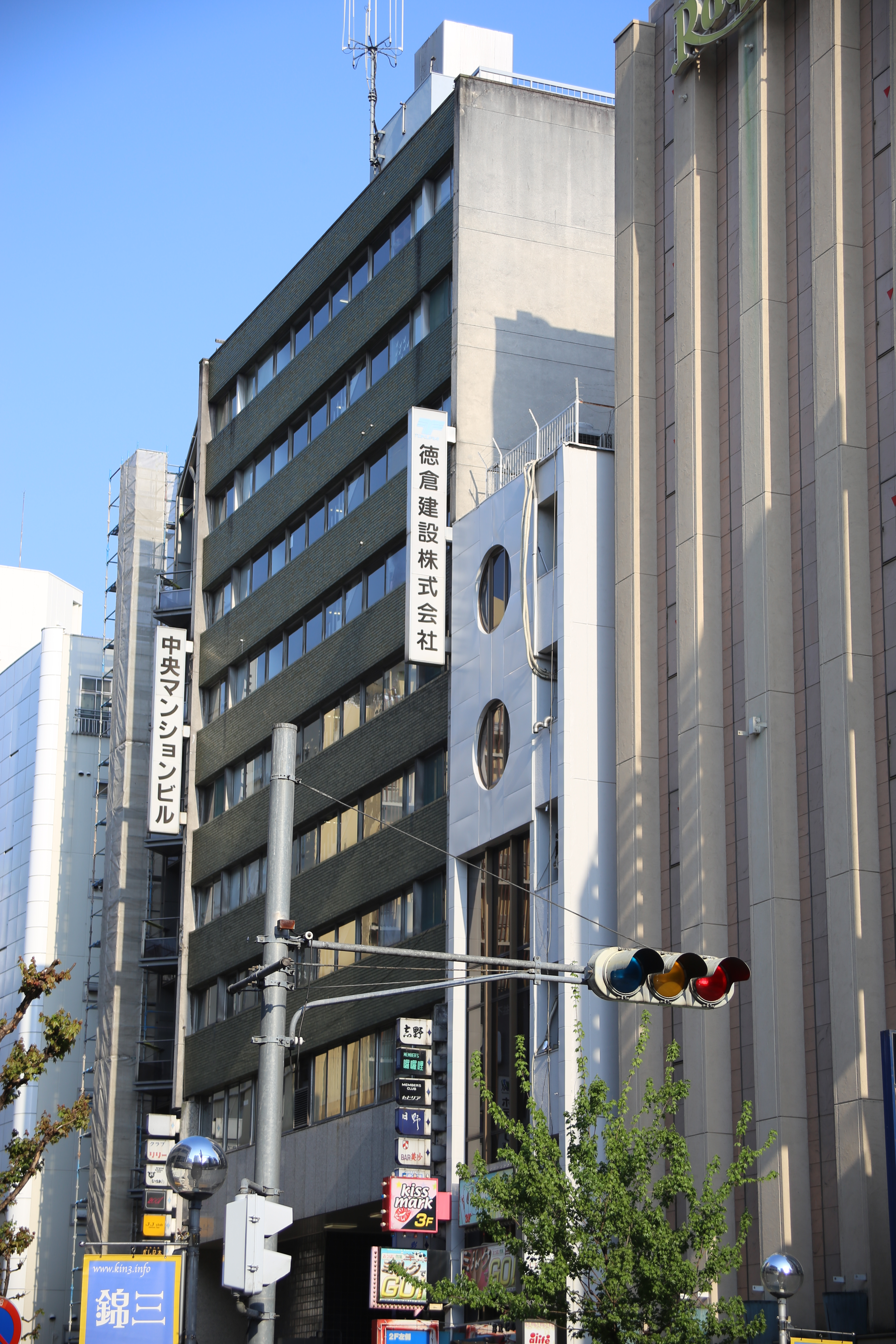 名古屋市中区錦三丁目の徳倉建設本社を北側公道西側より撮影